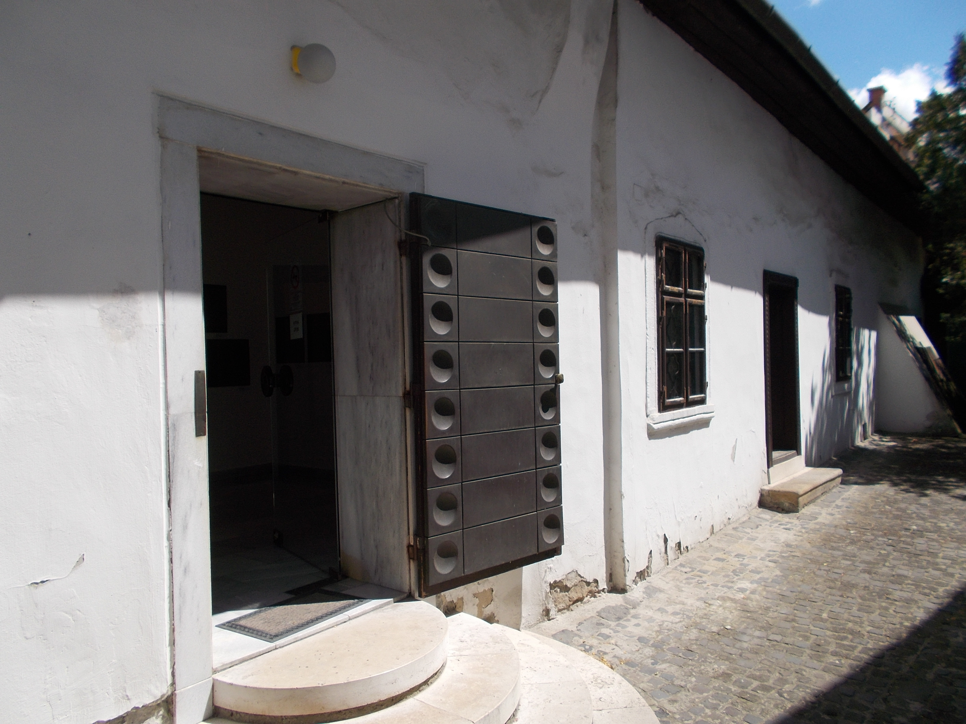 Barcsay Múzeum. Volt barokk lakóház. Udvar. Műemlék ID 7345. - Szentendre. Dumtsa Jenő utca 10 This is a photo of a monument in Hungary, Identifier: 7345 Object location47° 39′ 59.87″ N, 19° 04′ 35.8″ E